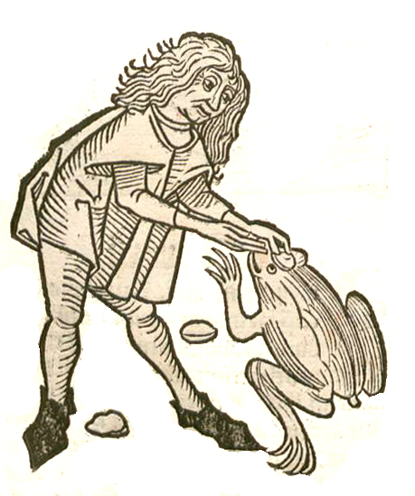 Abbildung von Borax - Krötenstein